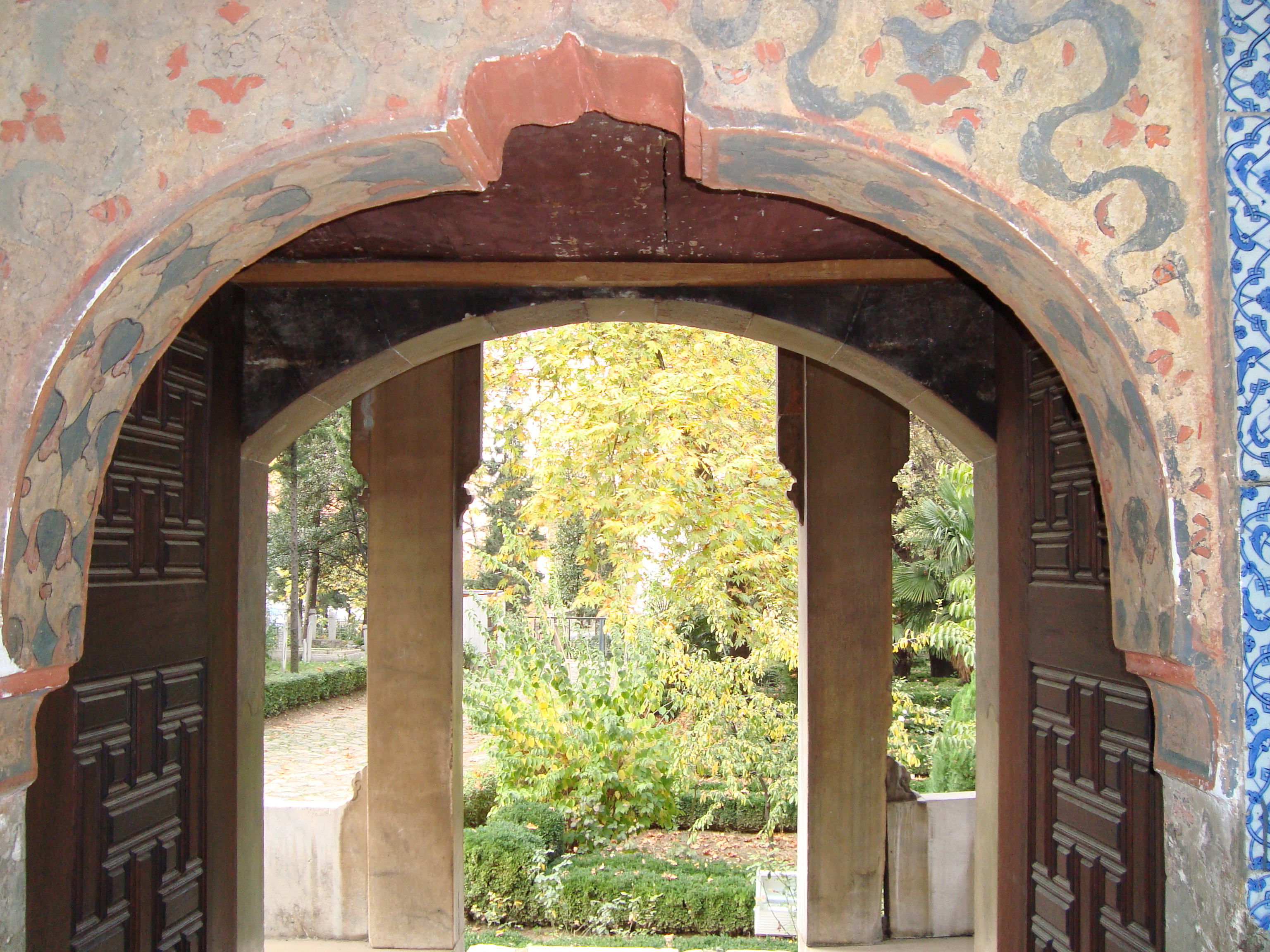 MURADİYE TÜRBELER